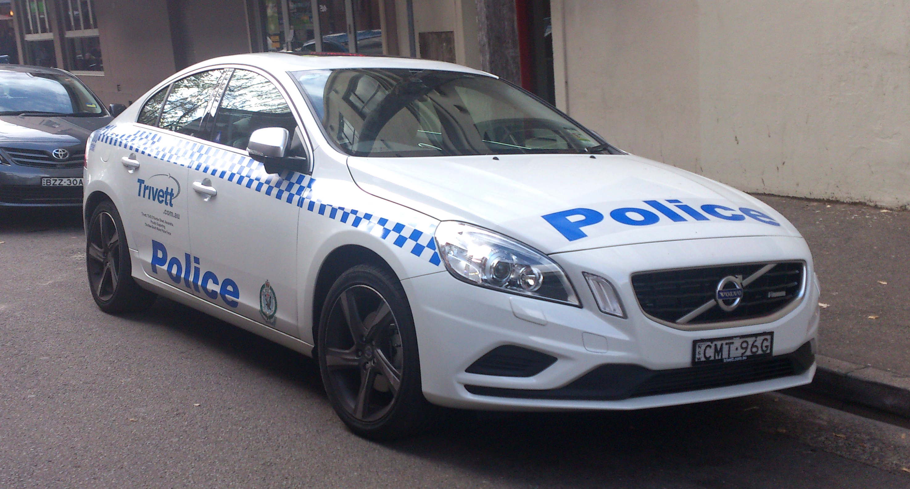 Volvo S60 T5